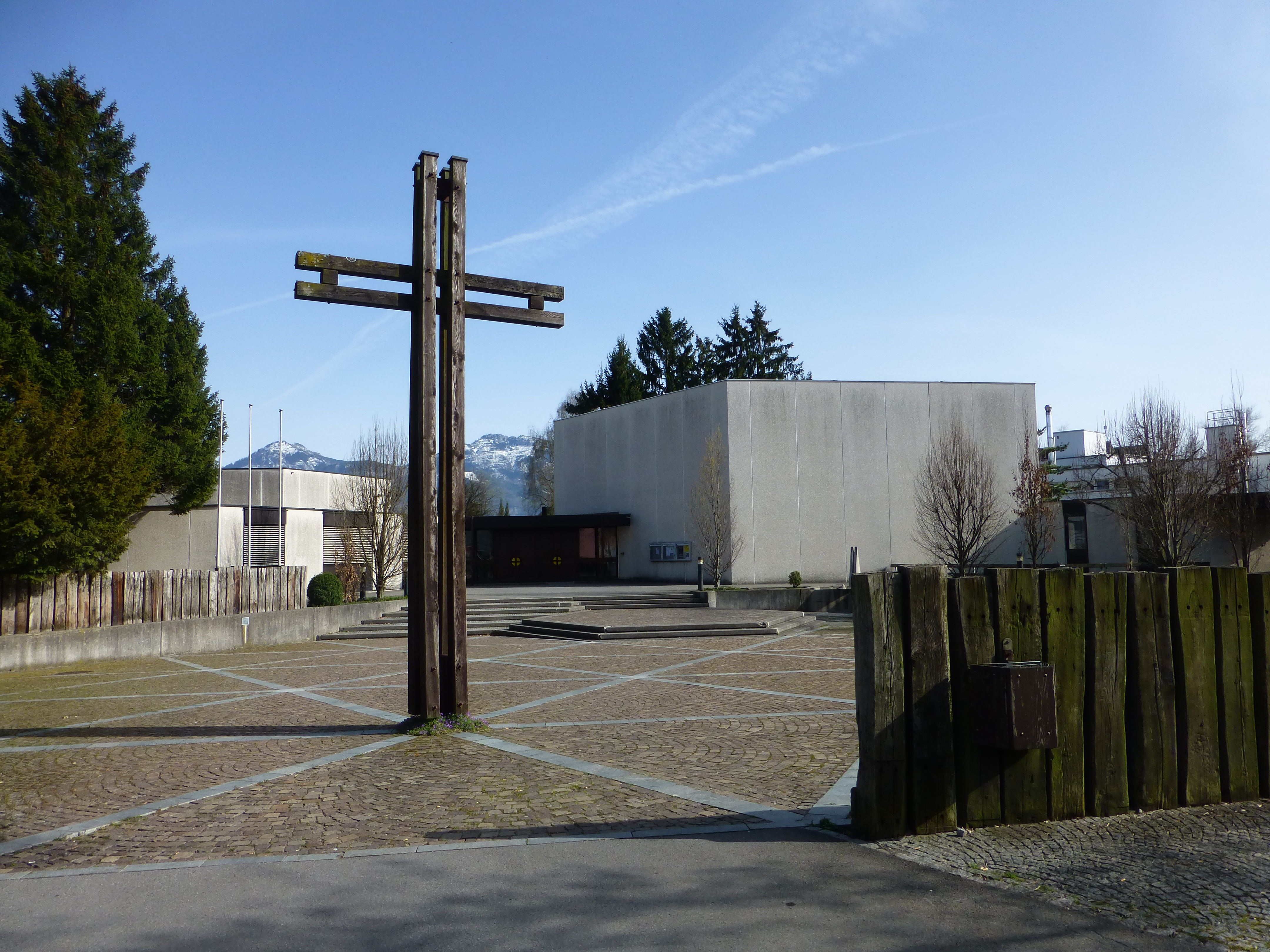 Außenansicht der Guthirtenkirche in Lustenau